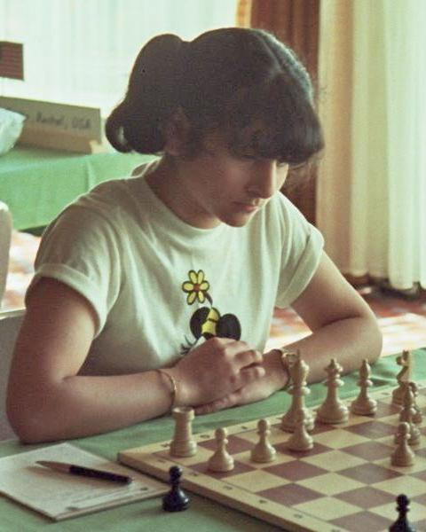 Giovanna Arbunic Castro 1982 in Bad Kissingen